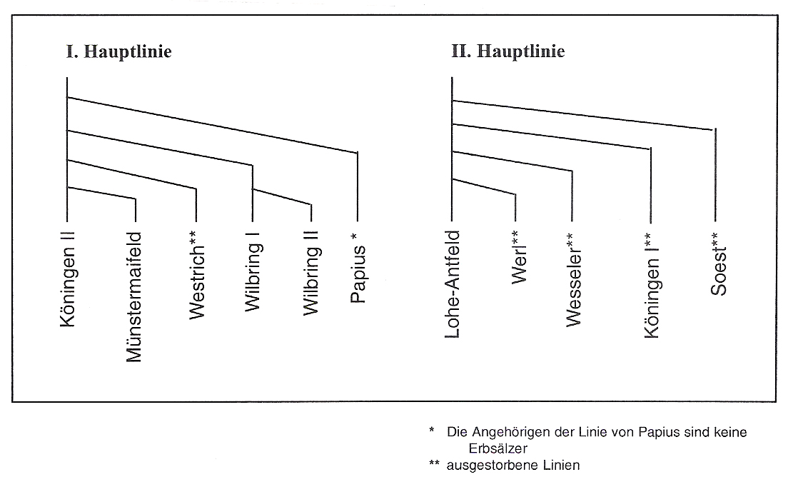 Die zweite Tafel der Linien des Geschlechtes von Papen